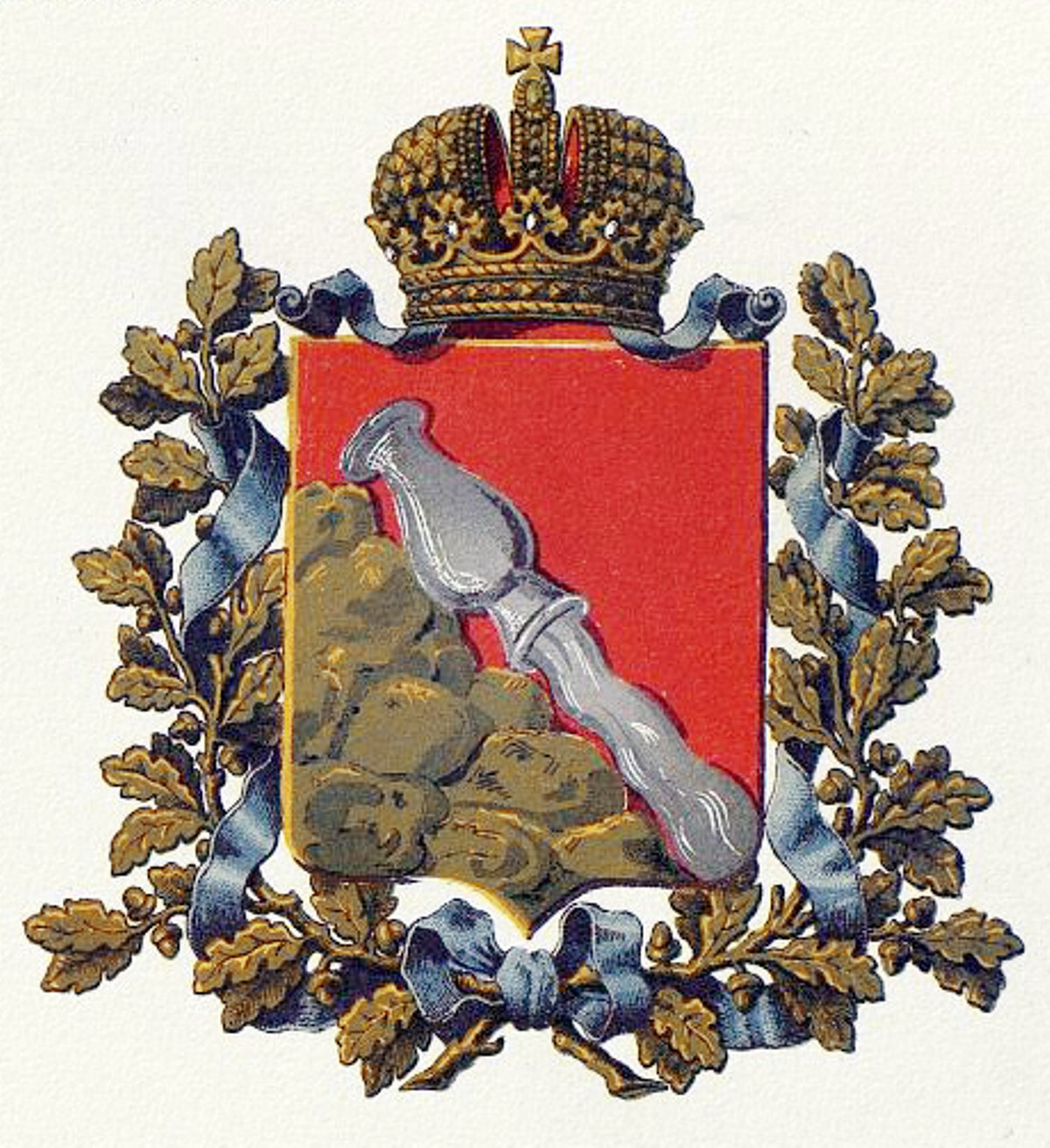 Official Russian Empire coat of arms Voronezh Governorate. Герб Российской Империи Воронежской губернии в Гербовнике Министерства внутренних дел Российской Империи 1880 года. Утверждён Императором Всероссийским Александром Вторым.